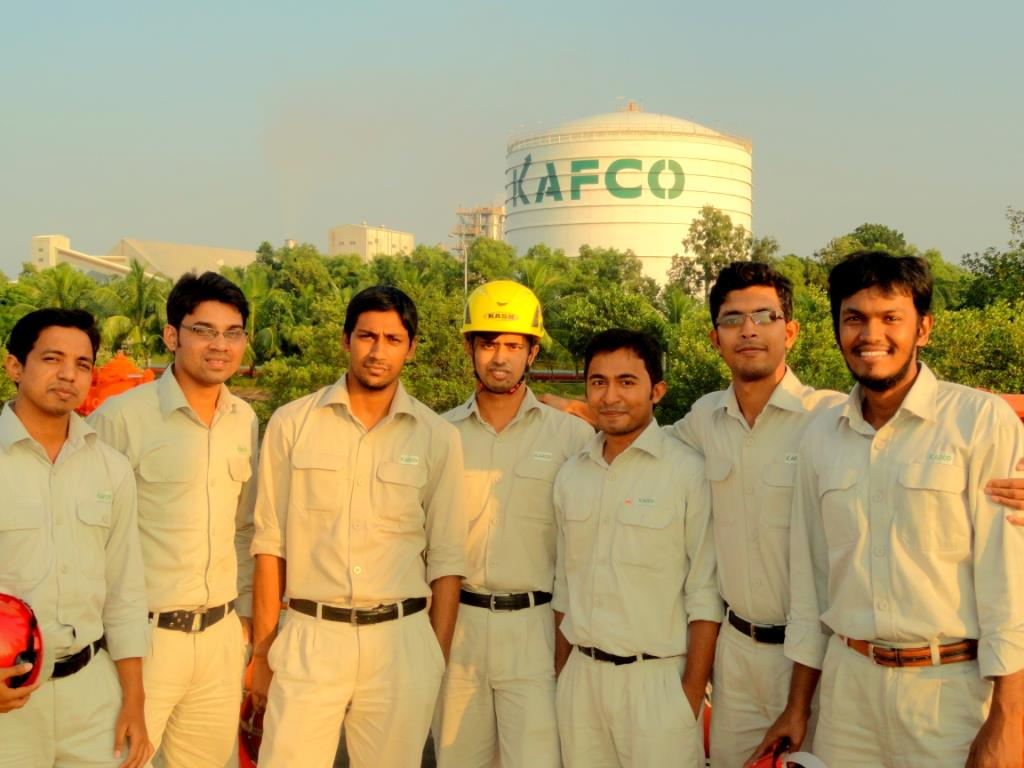 কাজের ফাকে কাফকোর ইঞ্জিনিয়াররা।